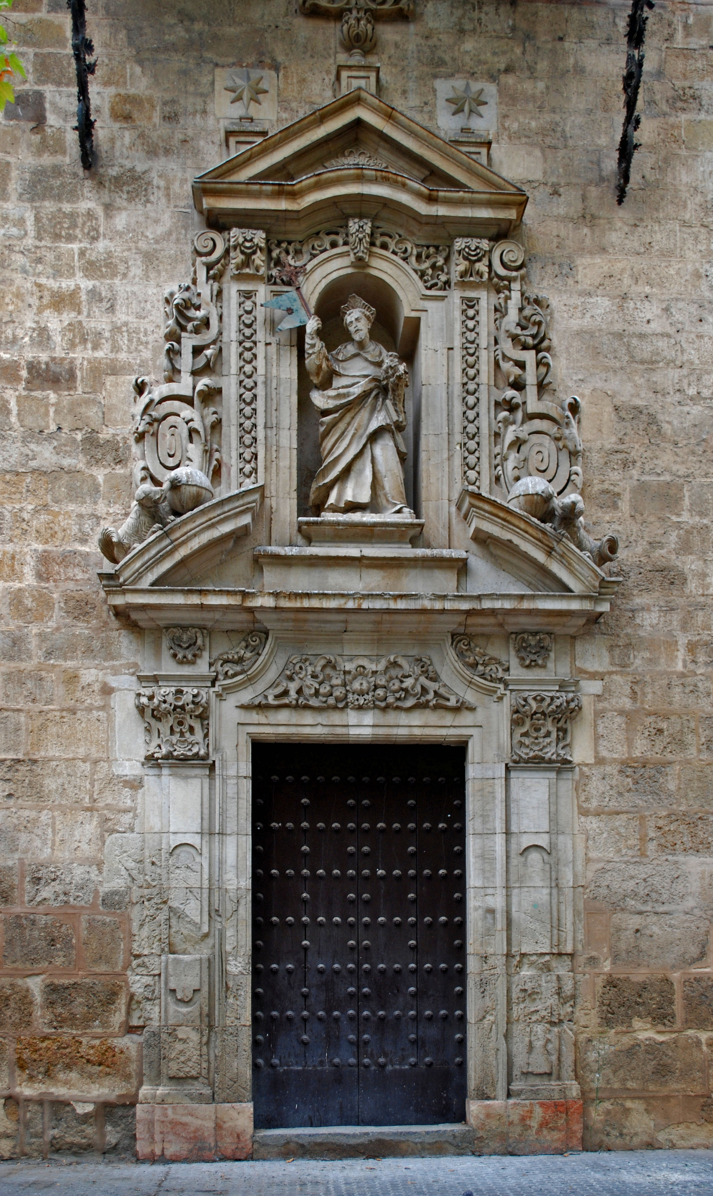 Iglesia de Santa María Magdalena (Sevilla), puerta menor a calle San Pablo y estatua de Santo Domingo de Guzmán